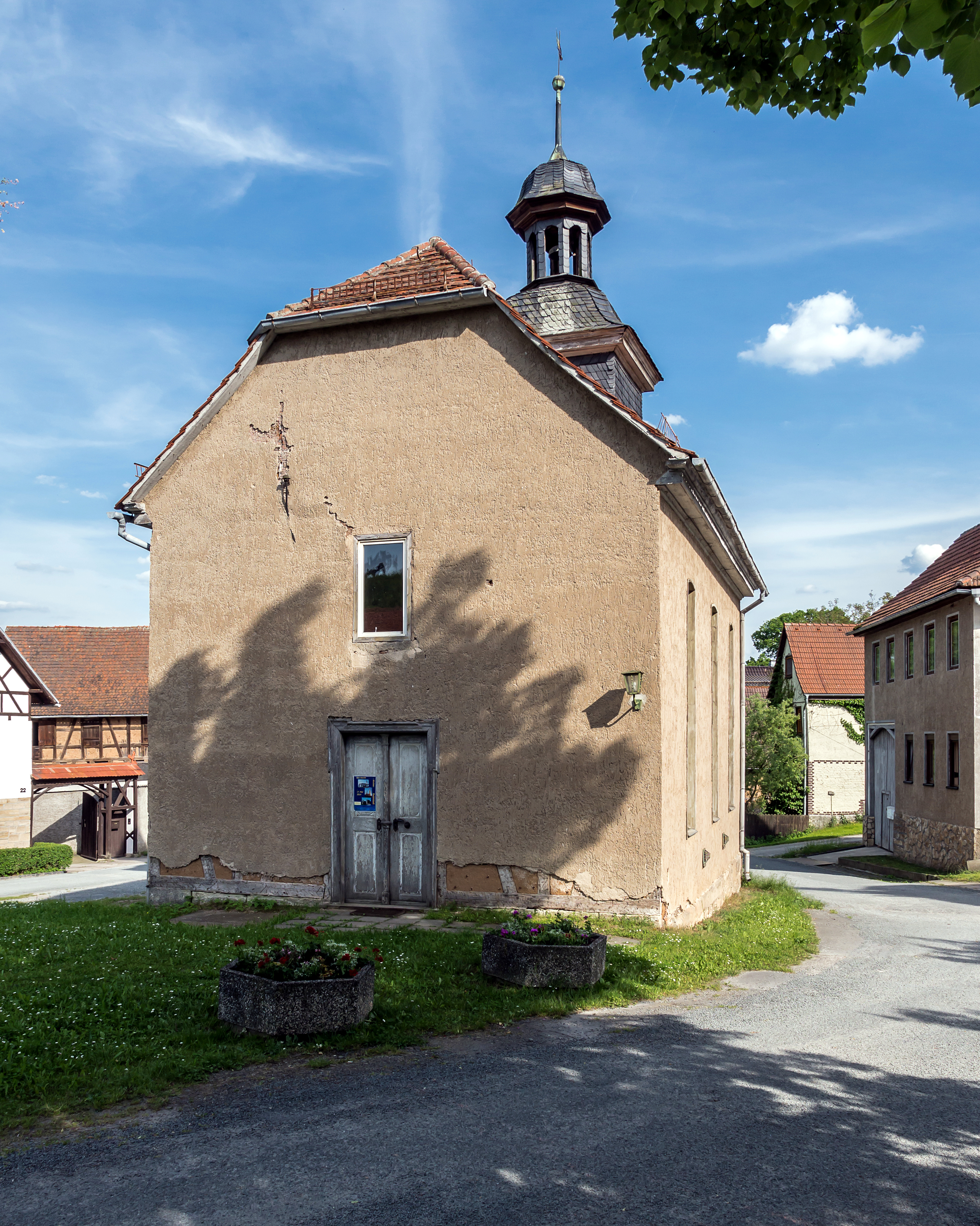 Denkmalgeschützte Kirche in Mörla, Ortsteil von Rudolstadt, Westansicht